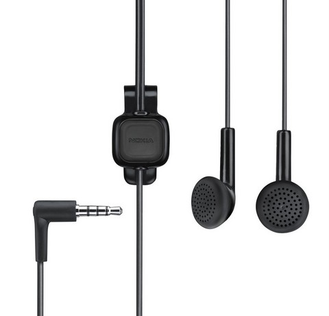 Найшники Нокиа